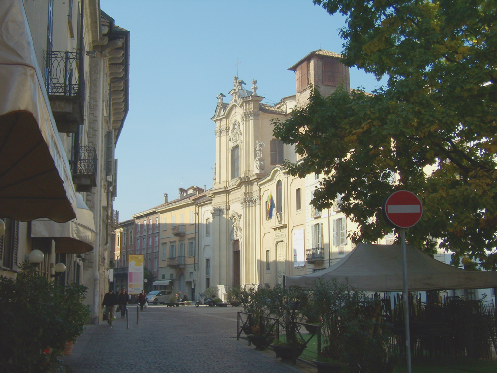 Vista di corso Umberto I a Lodi, con la chiesa di San Filippo Neri